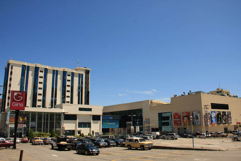 Plaza Shopping Mall from Venezuela